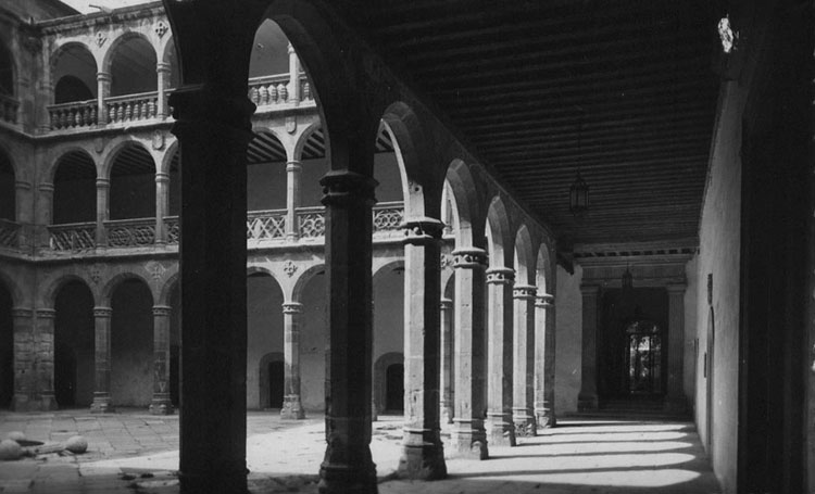 Palacio Universitario de Santa Cruz - Valladolid - Ed. GRECOR. Valladolid-Madrid - 74 Valladolid. Palacio Universitario de Santa Cruz. Claustro. - Tarjeta postal. Papel 138 x 85 mm B/N